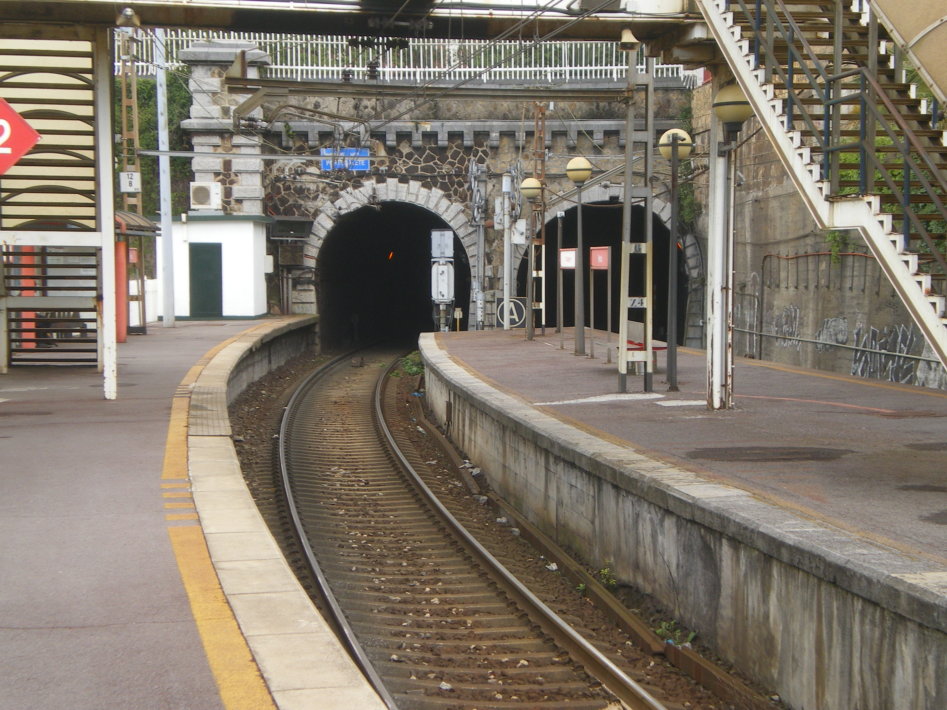 Gare de penota